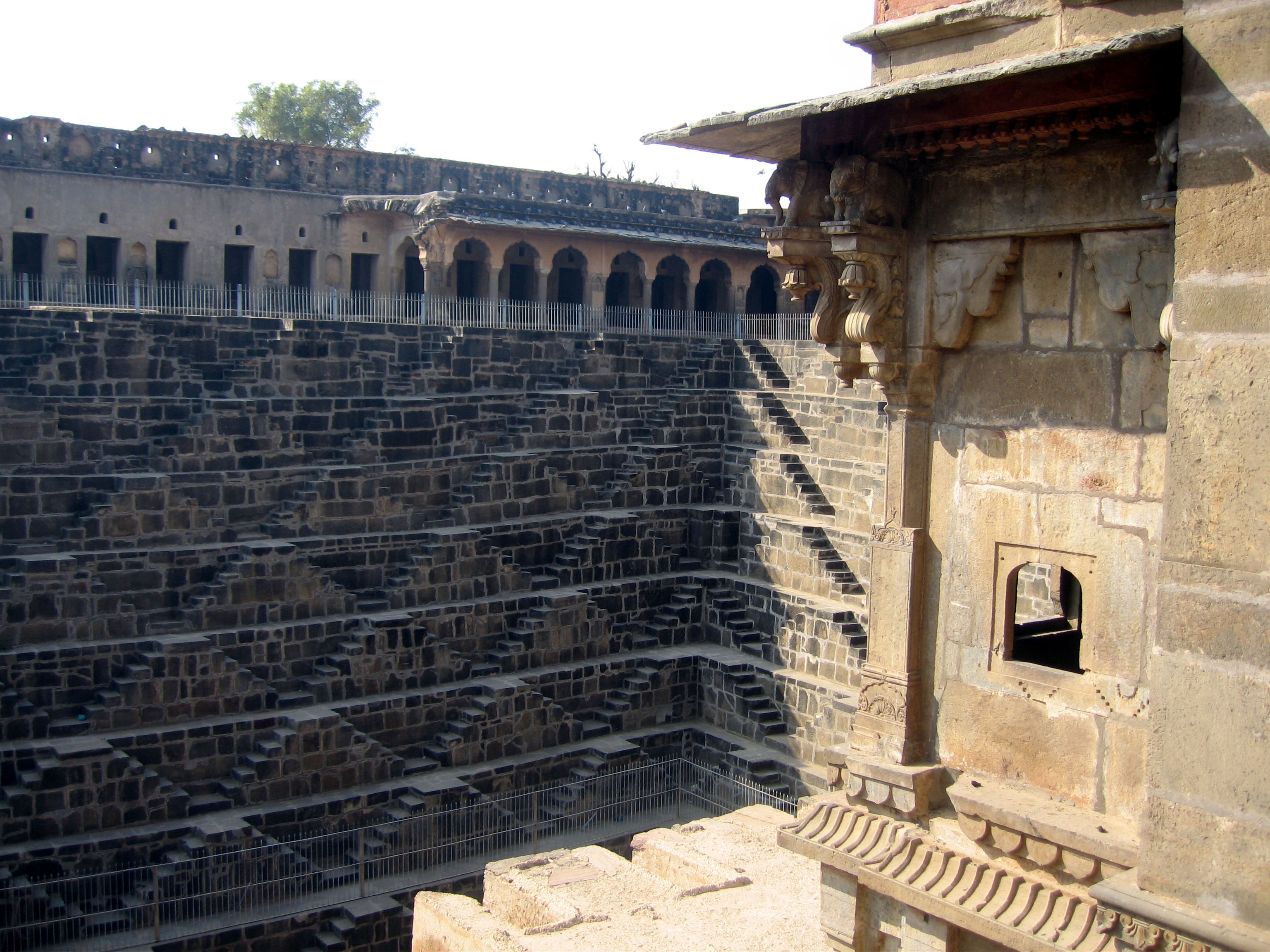 foto de Chand Baori en Abhaneri tomada por el autor